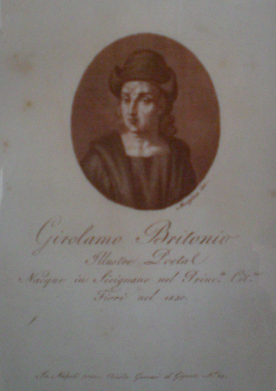 Stampa realizzata a fine 1800 ritraente Girolamo Britonio